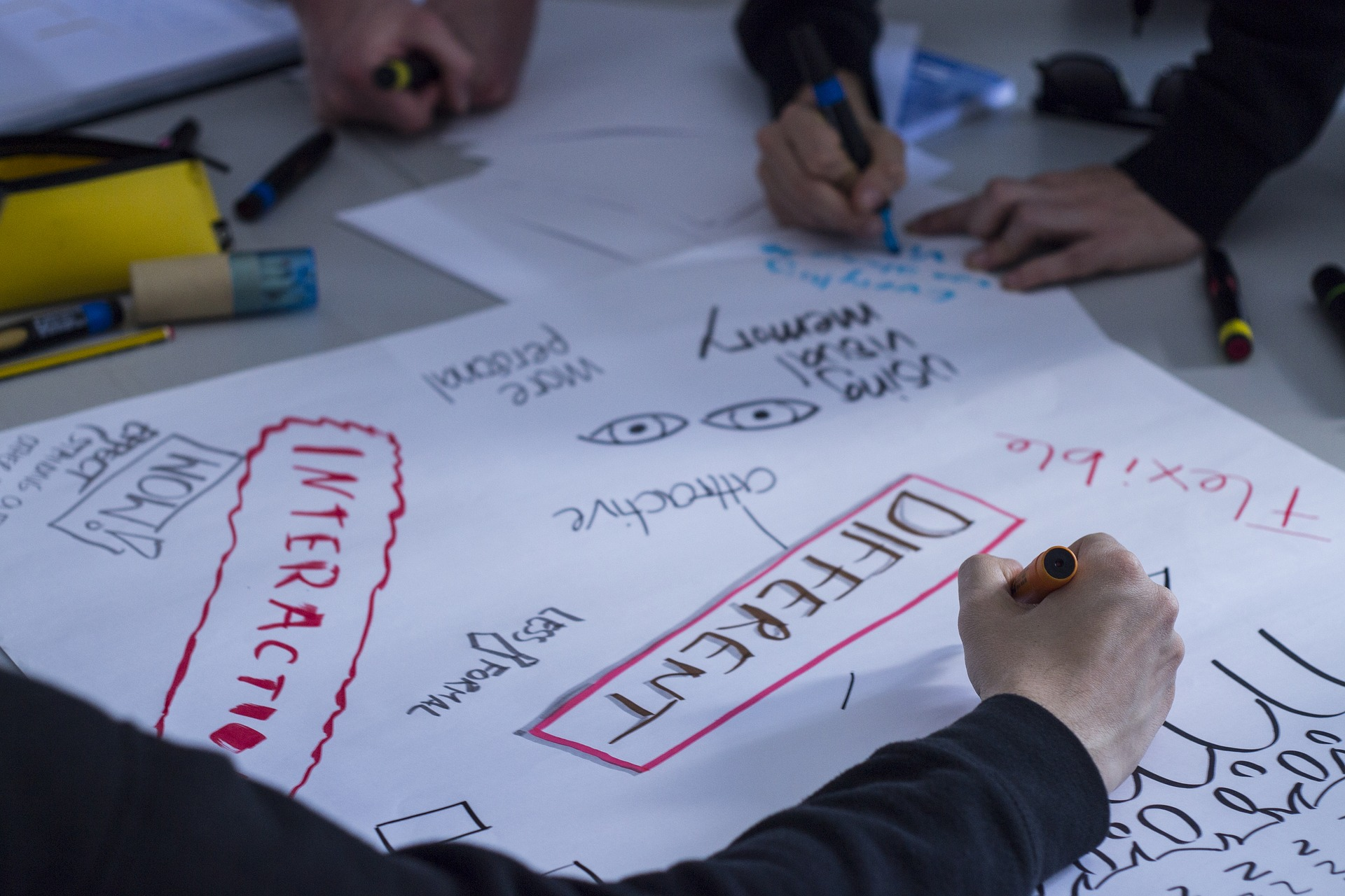 Cartell amb diferents paraules que descriuen l'educació social.